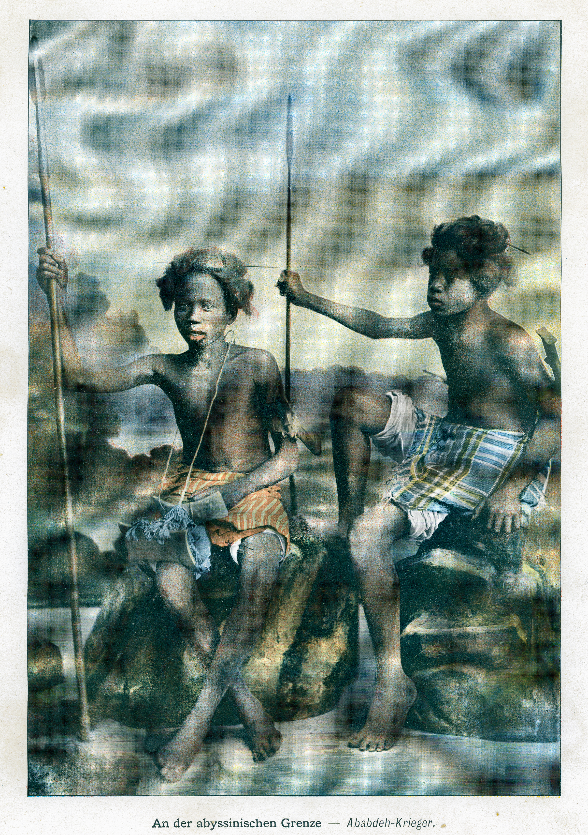 Deux guerriers Ababdehs - fin XIXème siècle